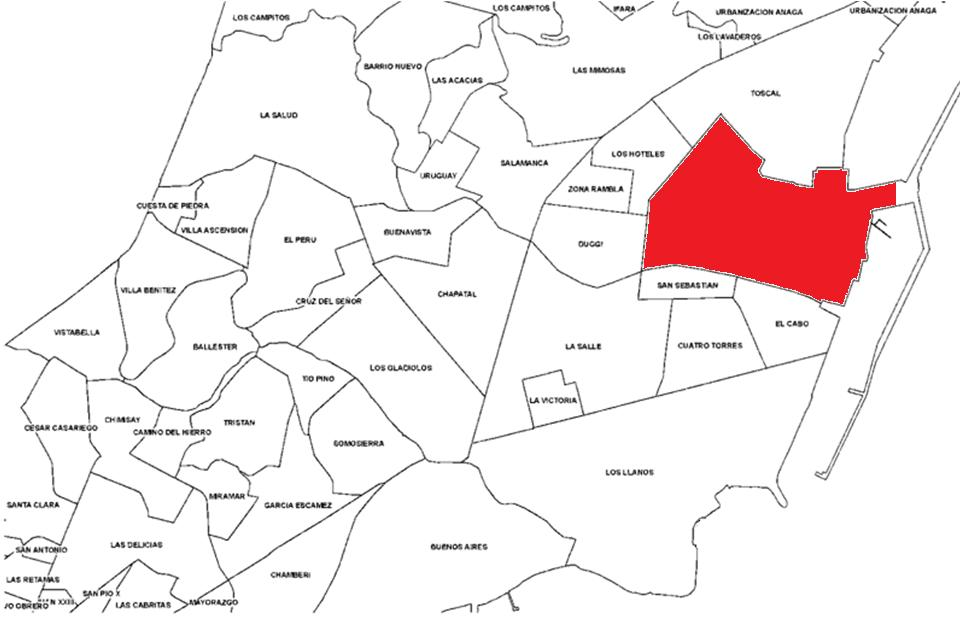 Localización del barrio.